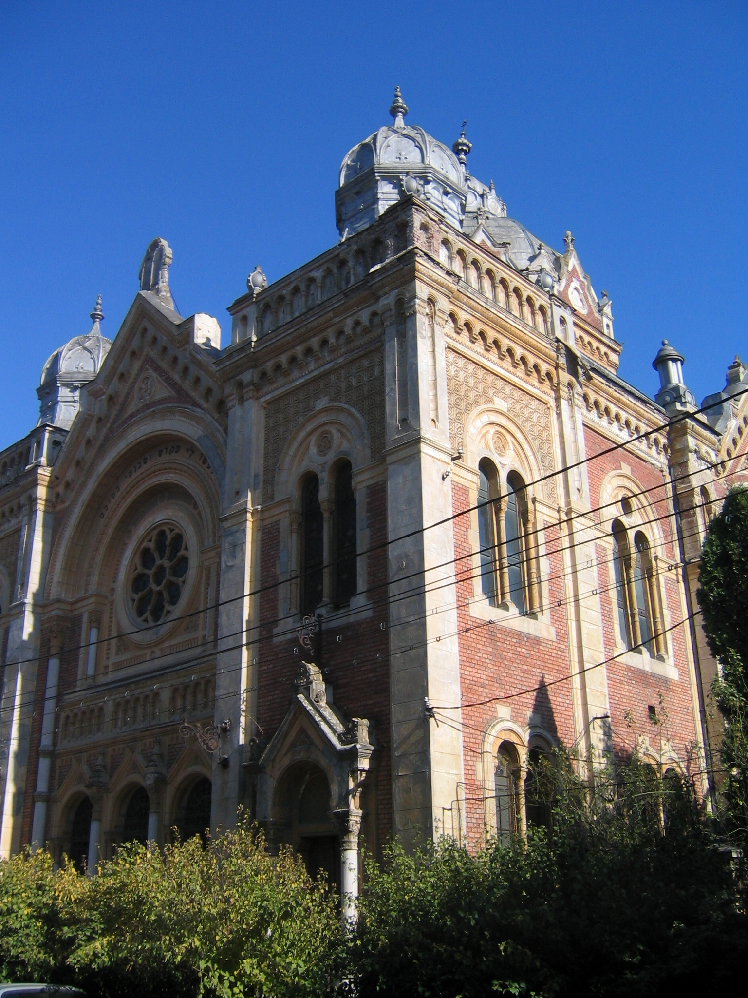 Sinagoga din Fabric, Timisoara, Romania